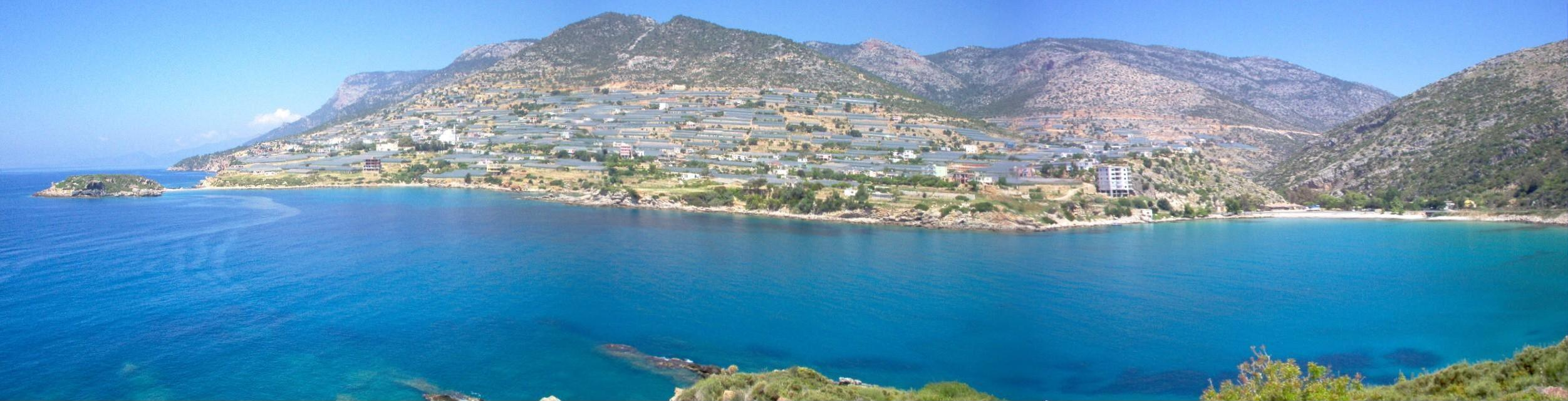 Aydıncık, Mersin